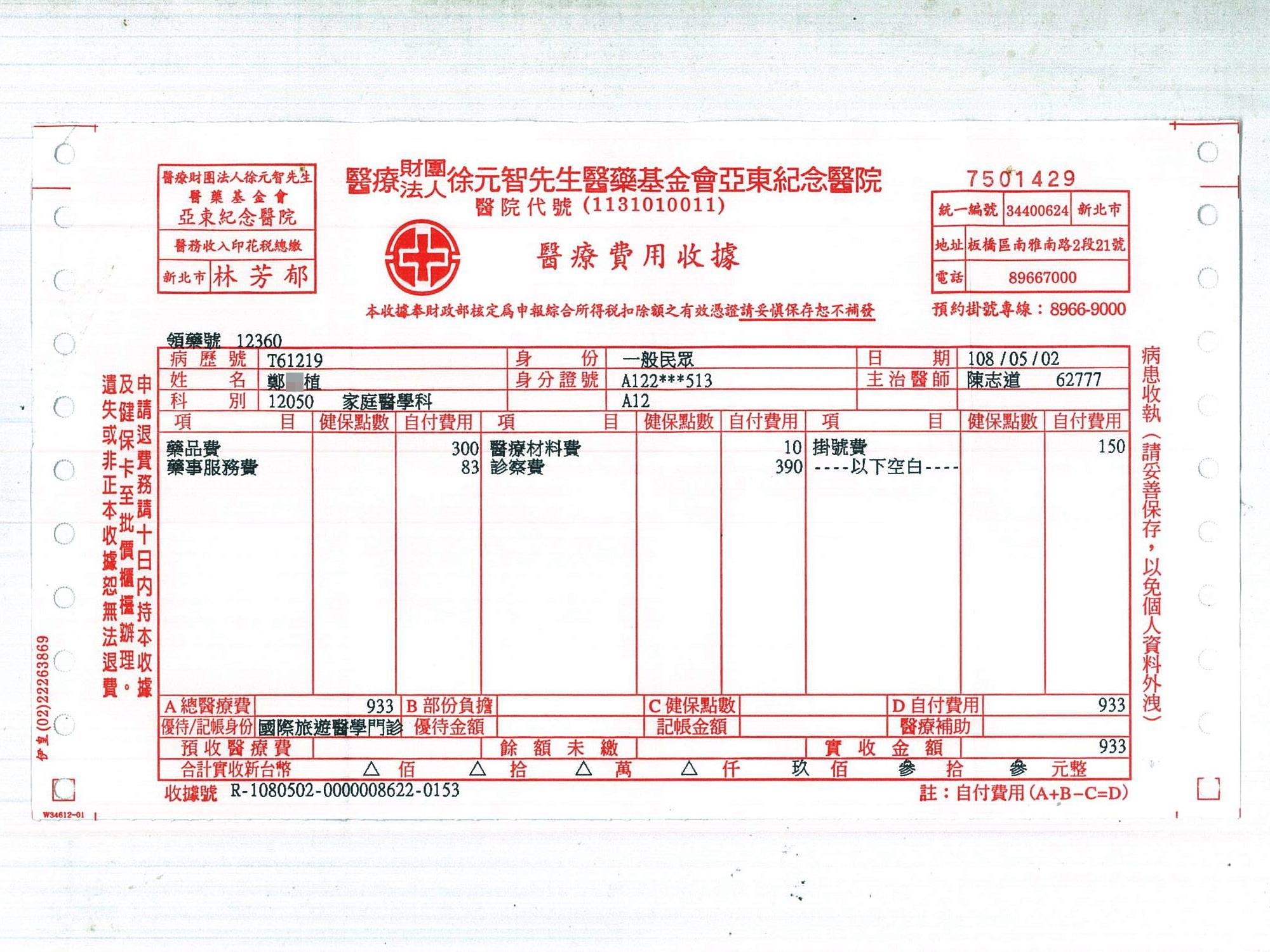 亞東紀念醫院醫療費用收據，收據號碼R-1080502-0000008622-0153。